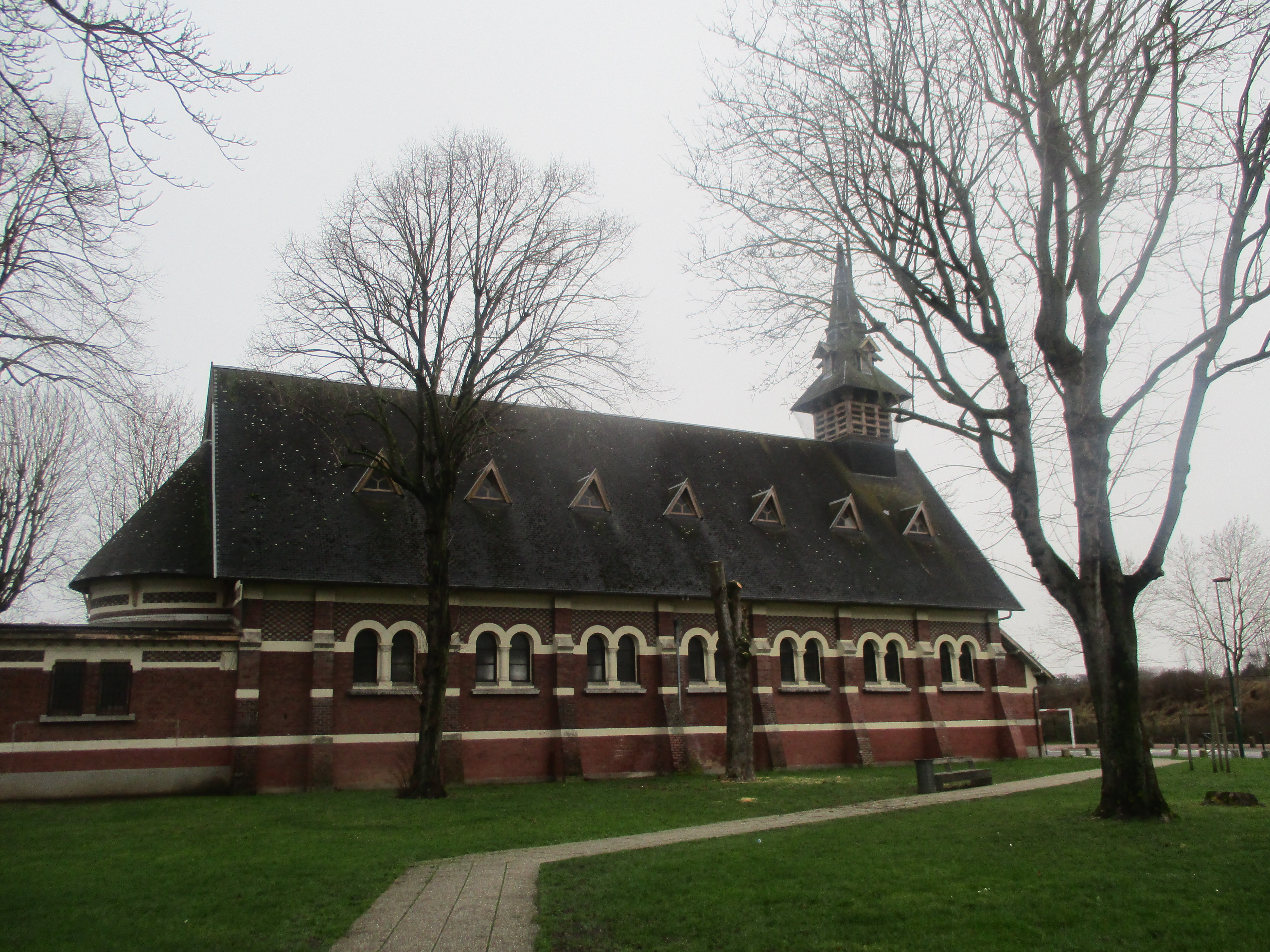 Église Saint-Théodore de Lens dans la cité Saint-Théodore, près du site de l'ancienne fosse n° 9, dont l'emplacement est occupé aujourd'hui par le Louvre-Lens.